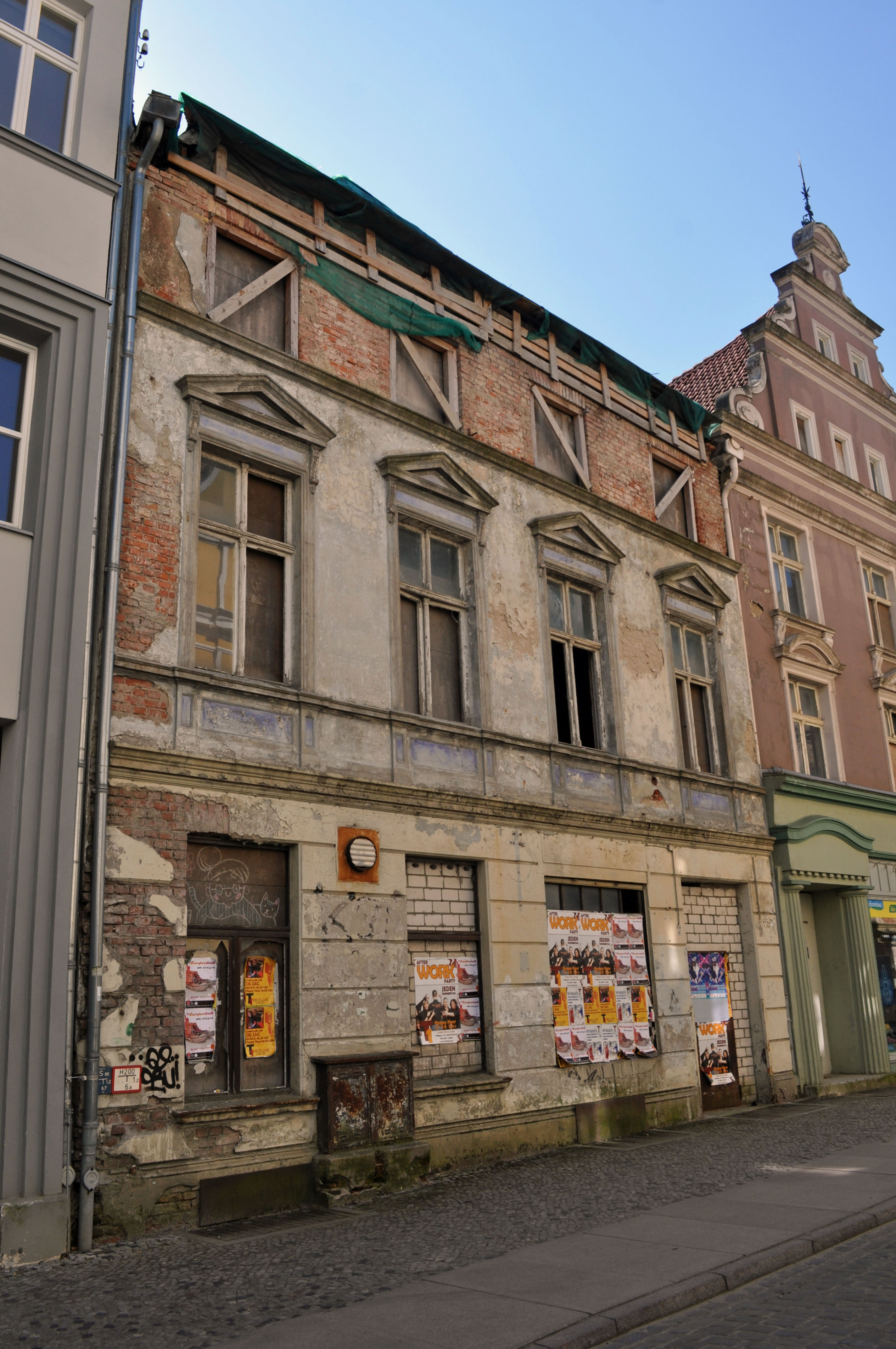 Gebäude bzw. Gebäudedetail in Stralsund. Straße und Hausnummer siehe Dateiname.